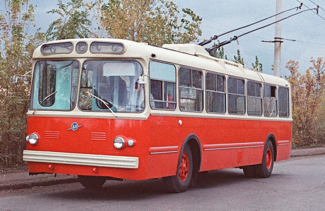 ЗиУ-5 возле завода